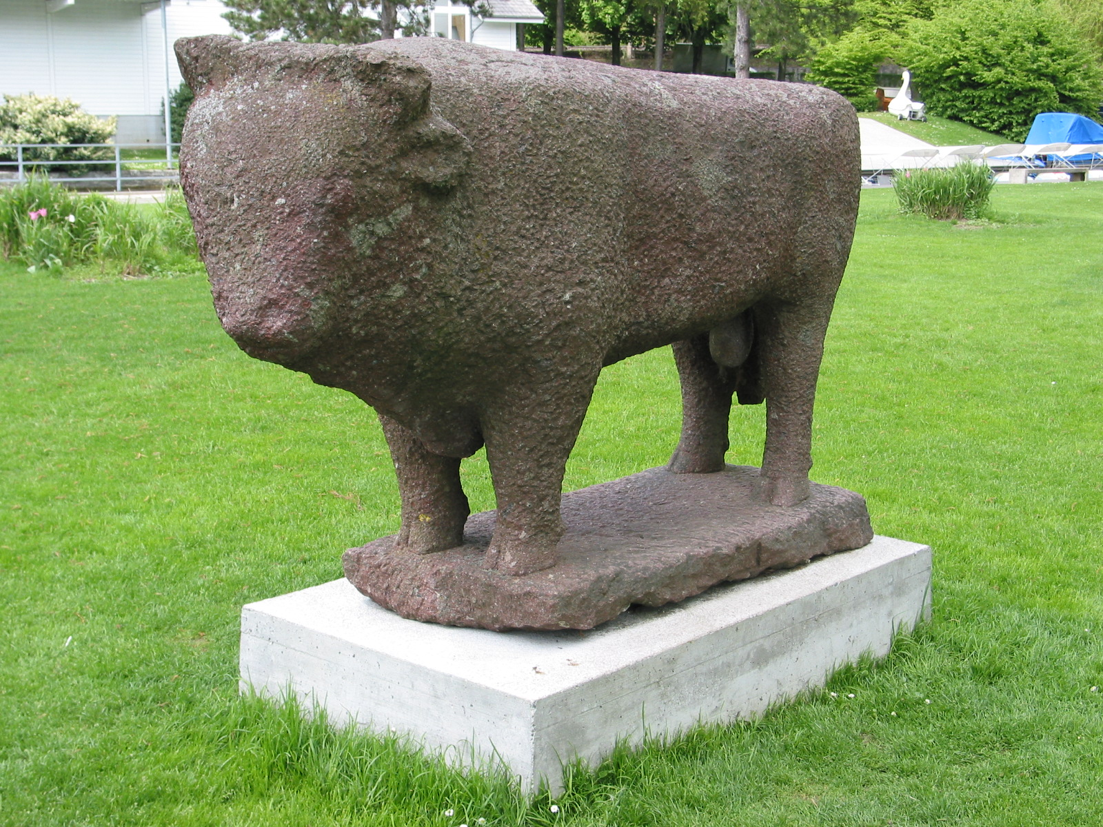 Sculpture Stier (1947) by Hans Aechbacher in Biel/Bienne (Switzerland)